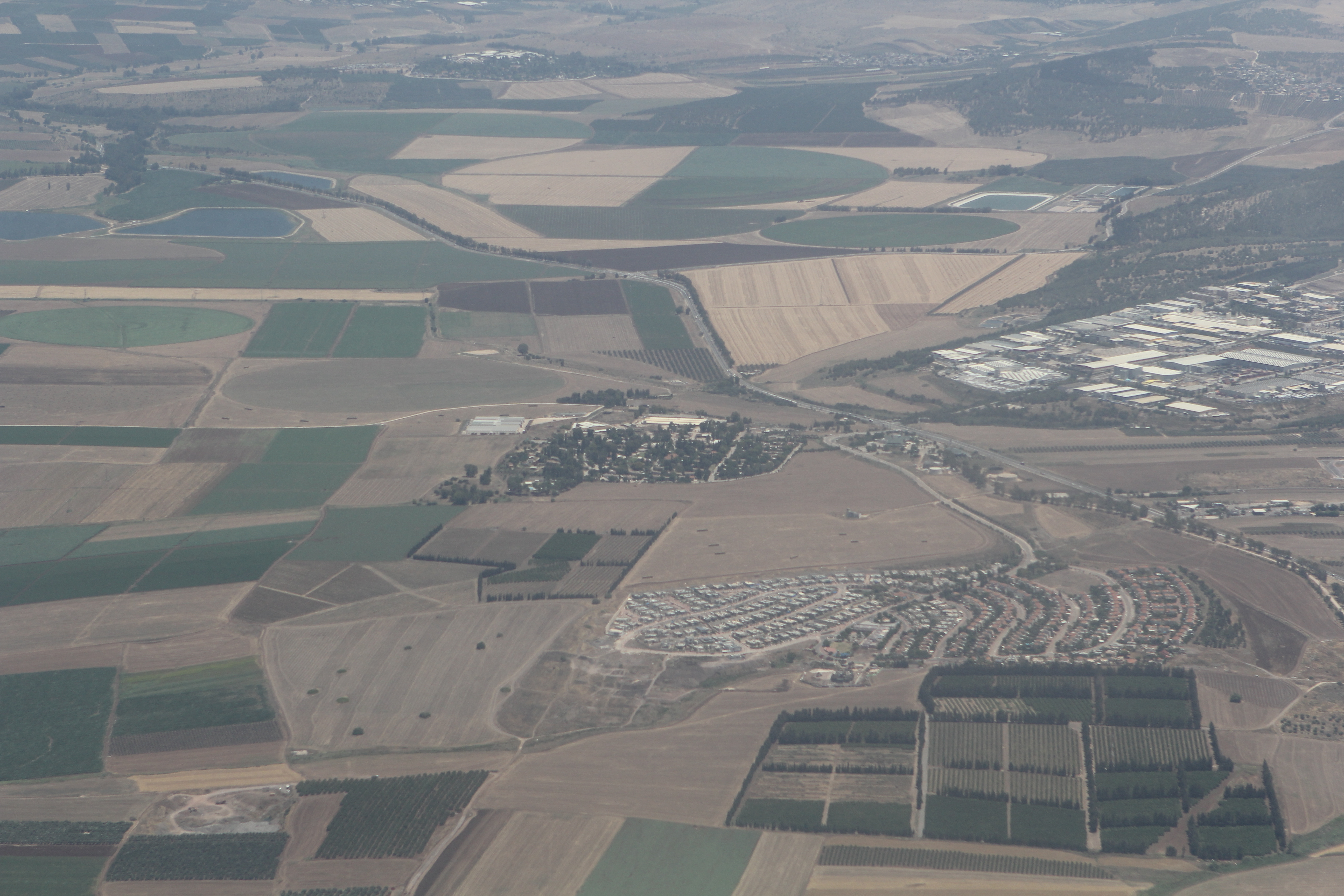 צילום אוויר של אחוזת ברק, דברת